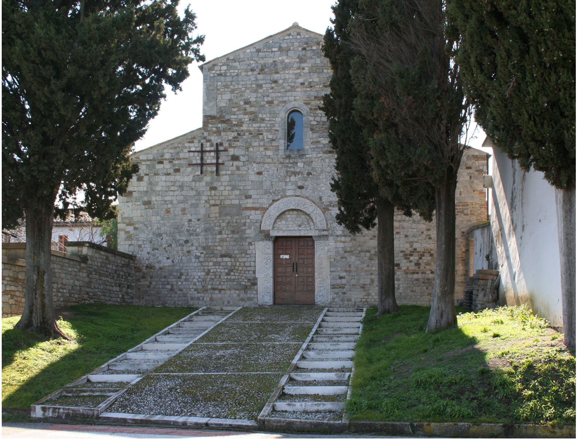 Chiesa di San Clemente al Vomano, facciata principale dell'edificio religioso appartenente al complesso abbaziale omonimo nel paese di Guardia Vomano in provincia di Teramo, Abruzzo, Italia, esterno giorno.